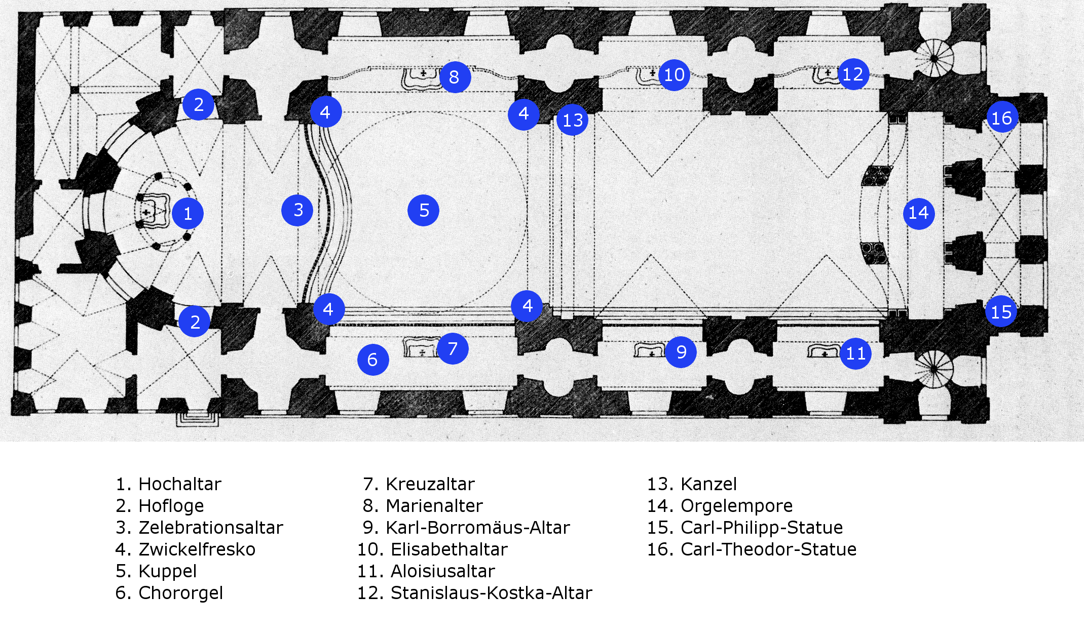 Grundriss der Jesuitenkirche in Mannheim.